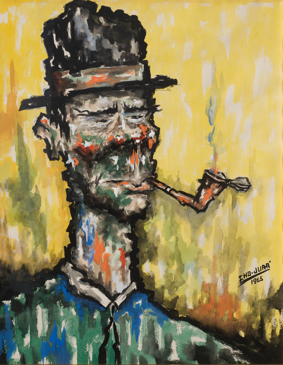 Sin Título 3